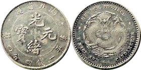 光绪元宝湖北省造库平一钱四分四厘银币，清代银辅币，面值二角。